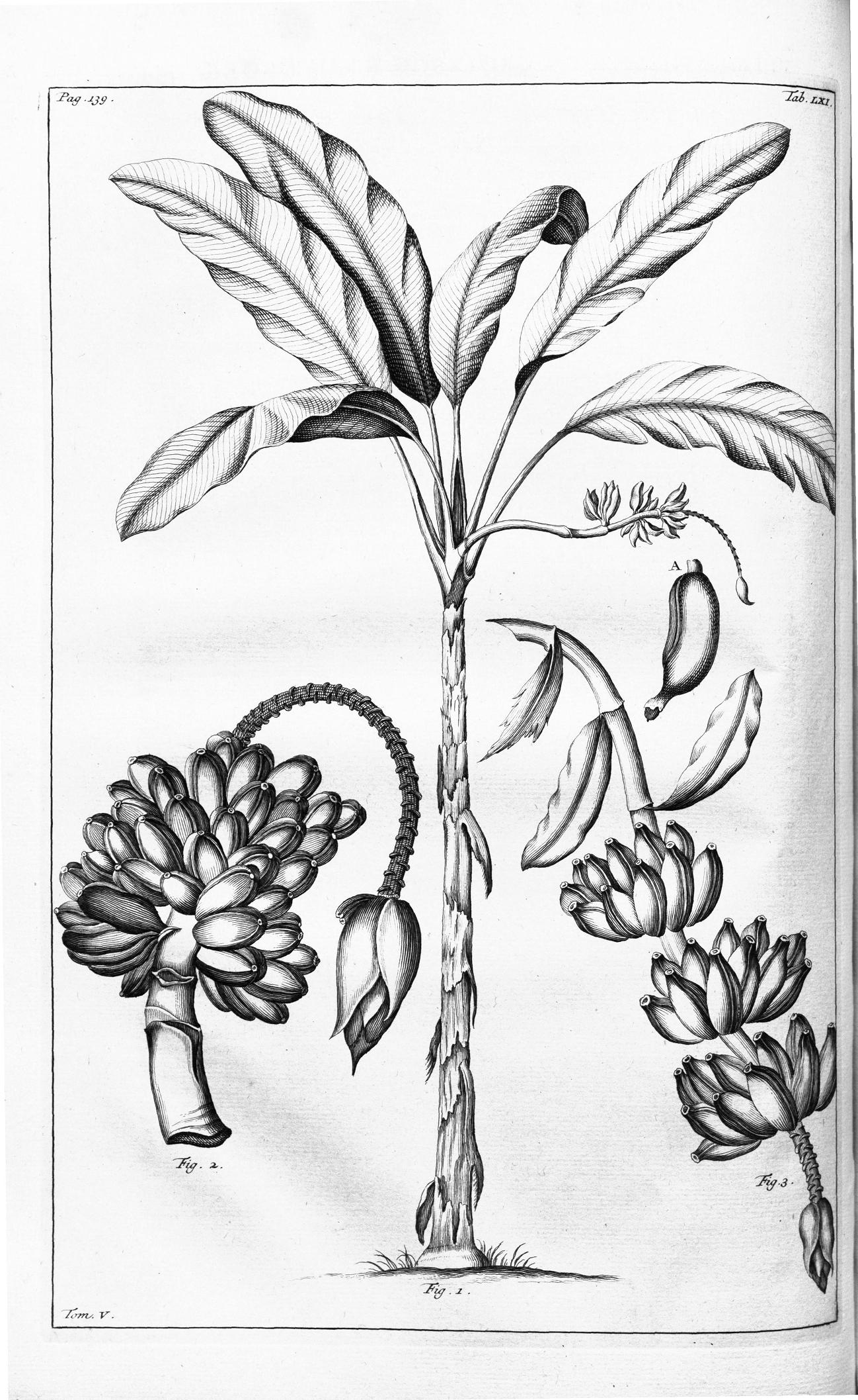 Illustration de Musa uranoscopos, planche extraite de Herbarium Amboinense volume V page 139